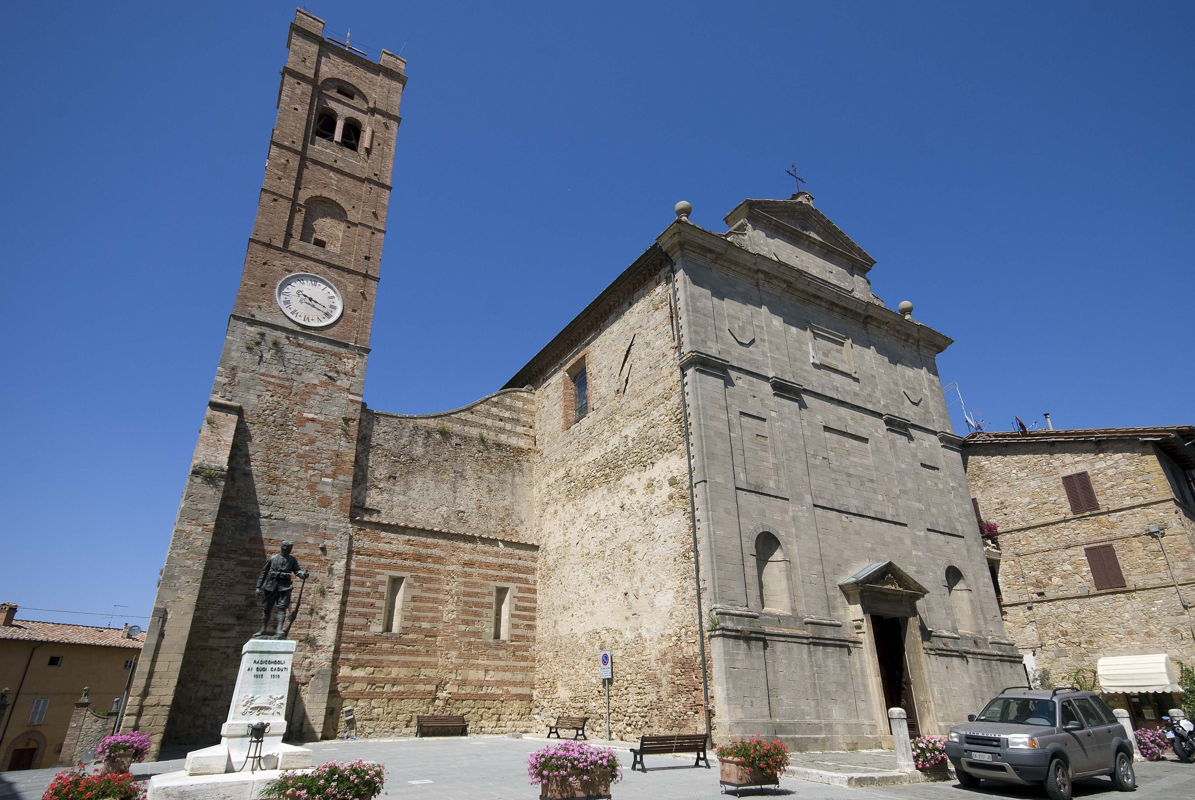 veduta esterna della collegiata di Radicondoli